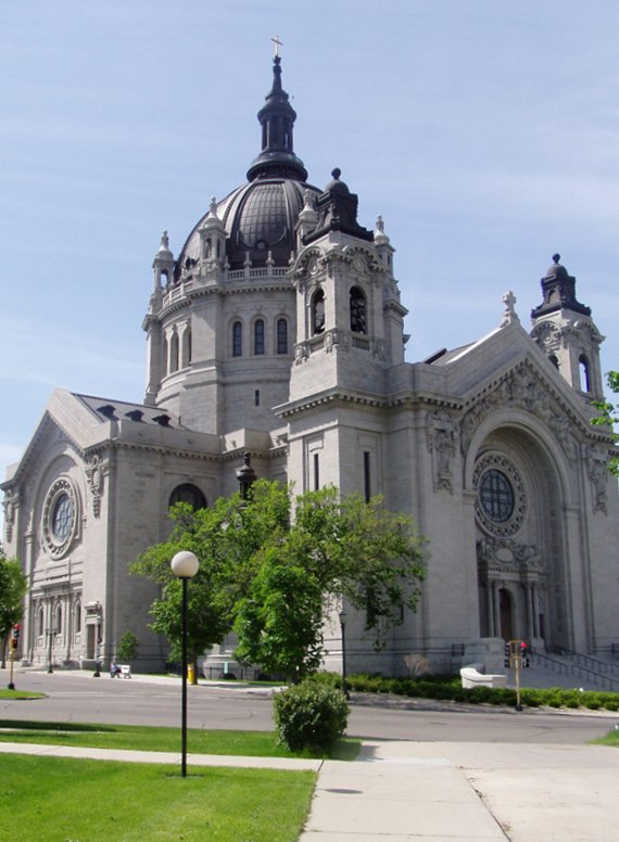 Taken from Selby Av side; 2006.